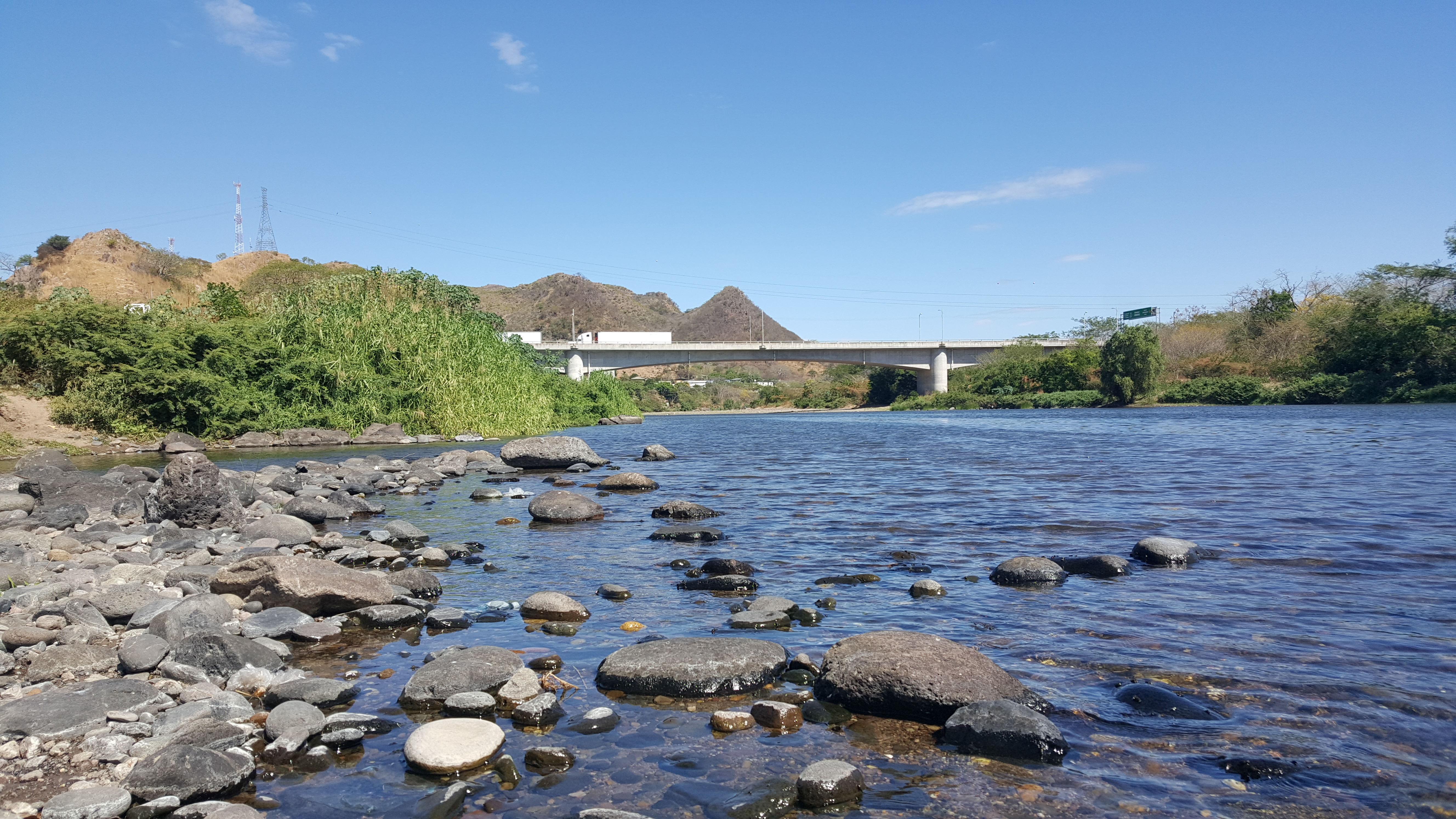 Río Goasgorán en departamento de La Unión El Salvador